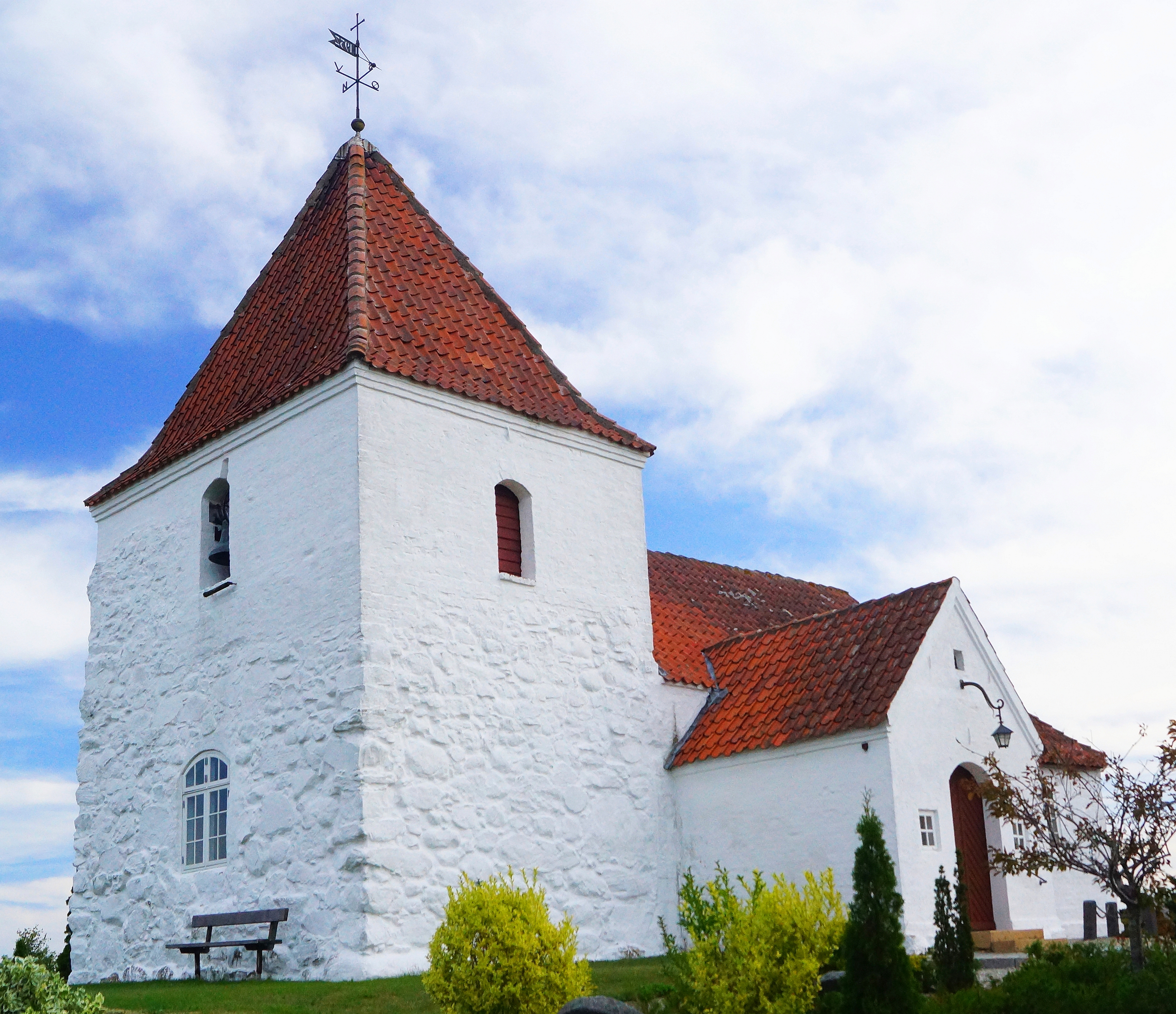 Udby Kirke